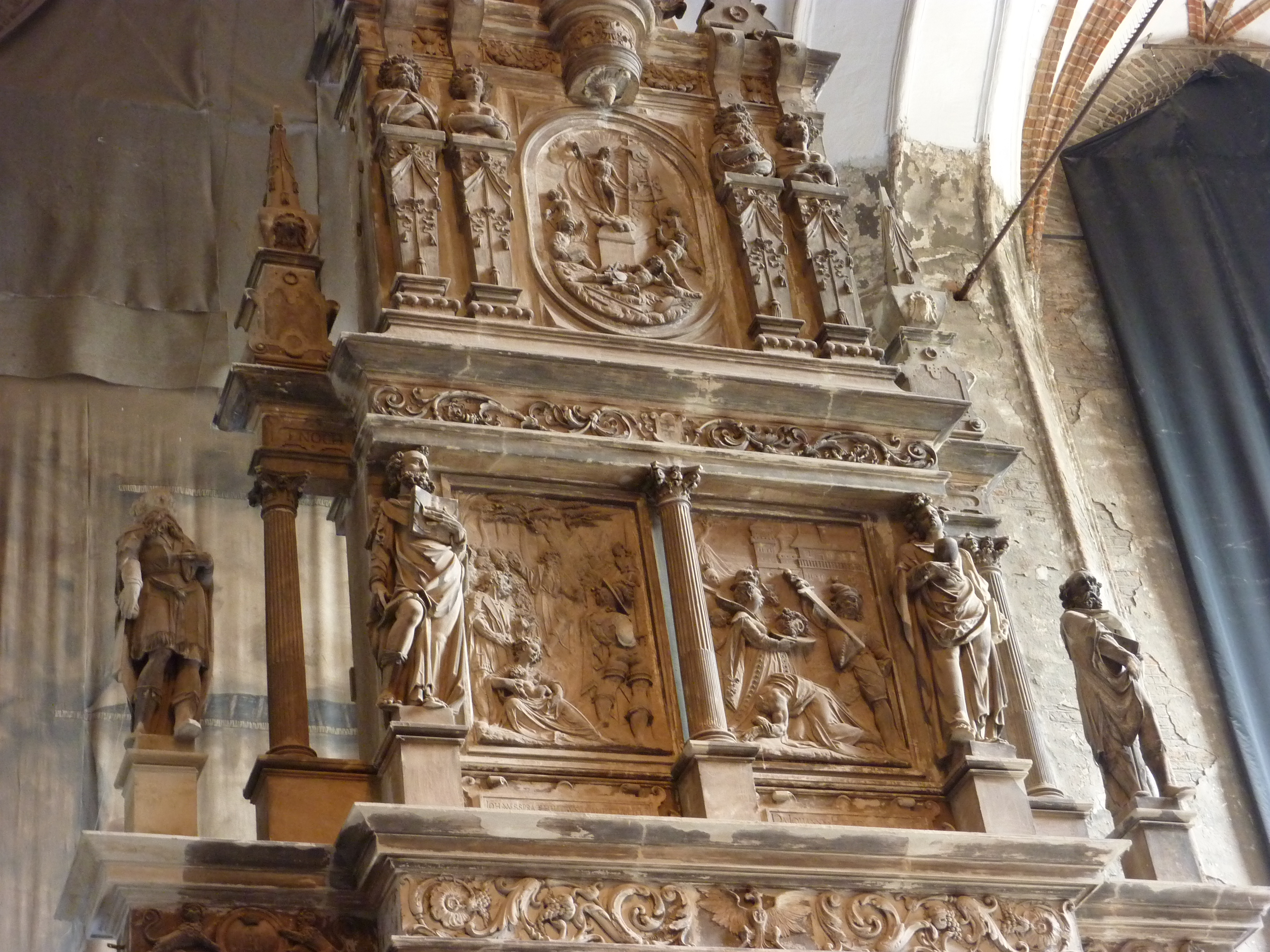 Fragment ołtarza kościoła św. Jana w Gdańsku.